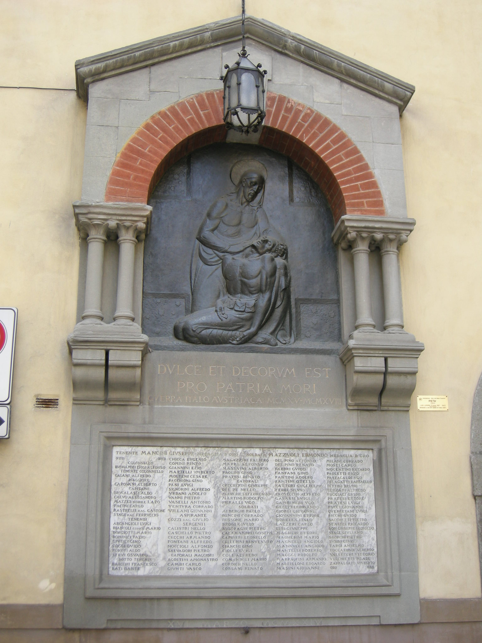 Tabernacolo piazza san felice con pietà luigi luparini